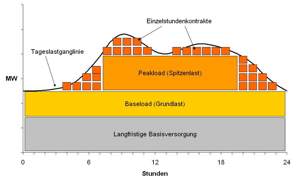 Stromverbrauch, untertägiges Lastprofil